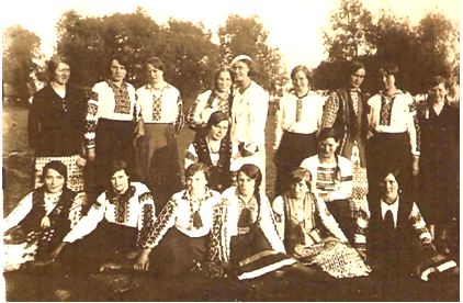 Кружок куховарства і вишивки осередку «Союзу Українок», 1936р